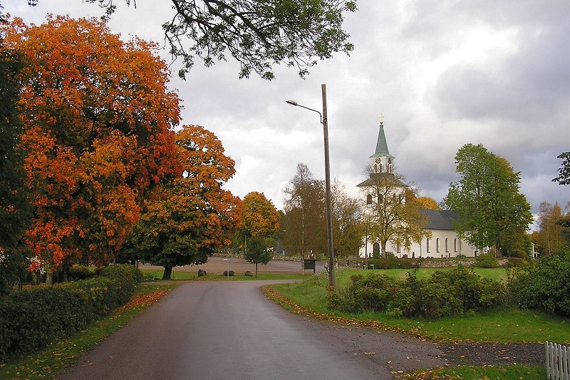 Gamla landsvägen genom Loshult och Loshults kyrka, från sydväst hösten 2008.